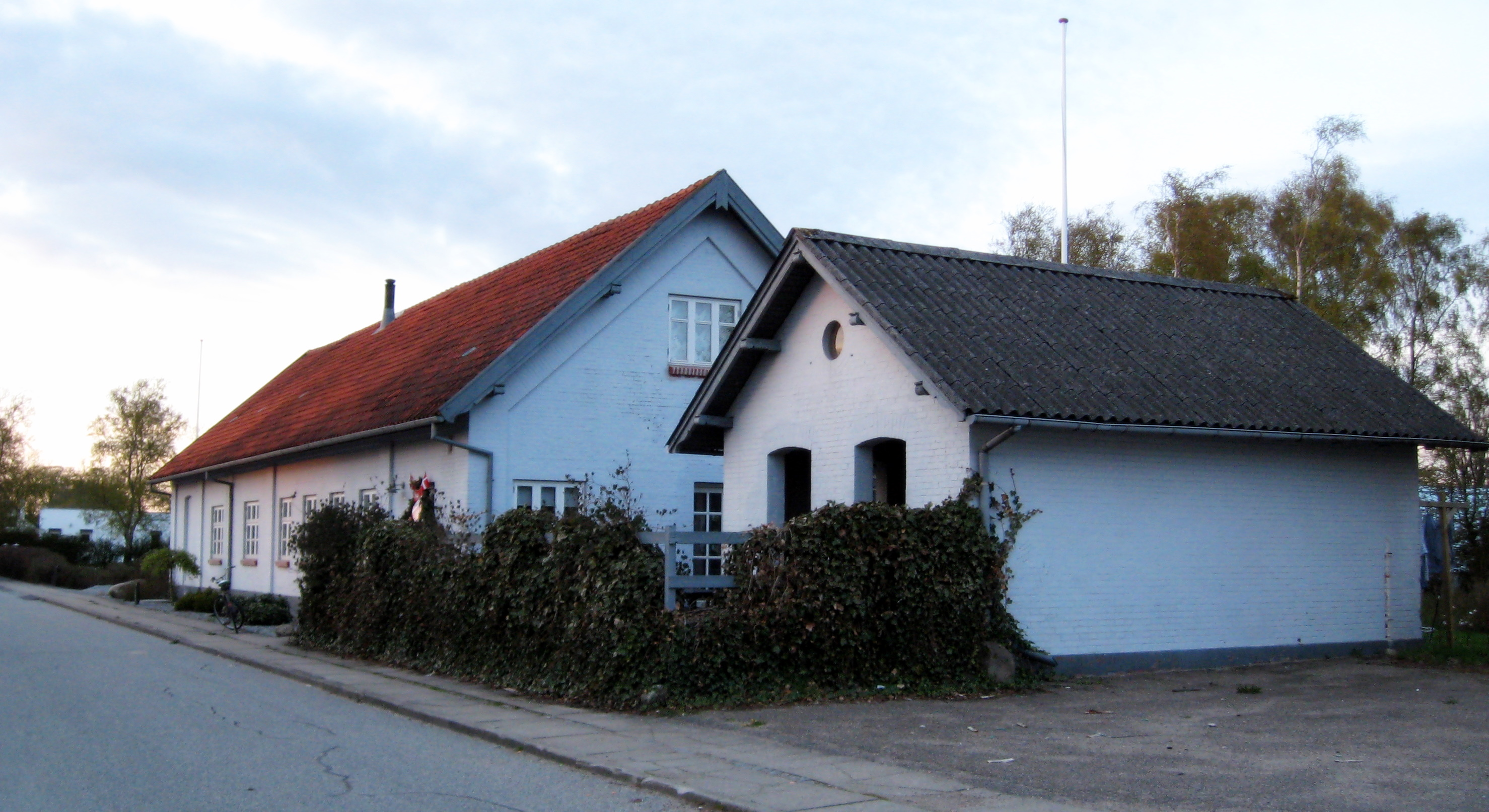 Hørby Gl. Station, Hjørring-Hørby Jernbane